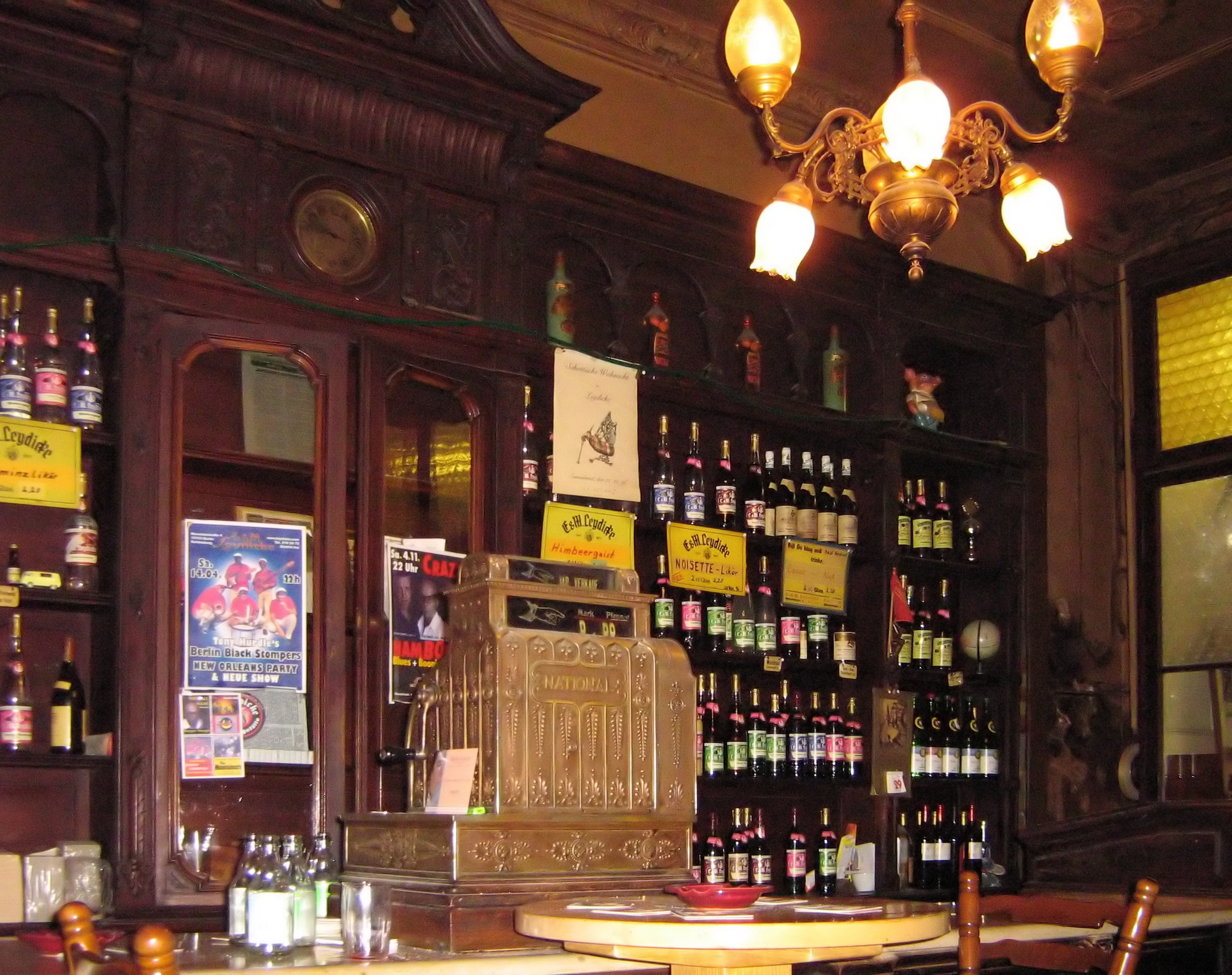 Deutschland, Berlin-Schöneberg, Mansteinstr.4: Innenansicht Altberliner Gaststätte Leydicke